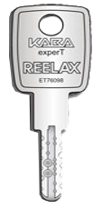 Clés REELAX